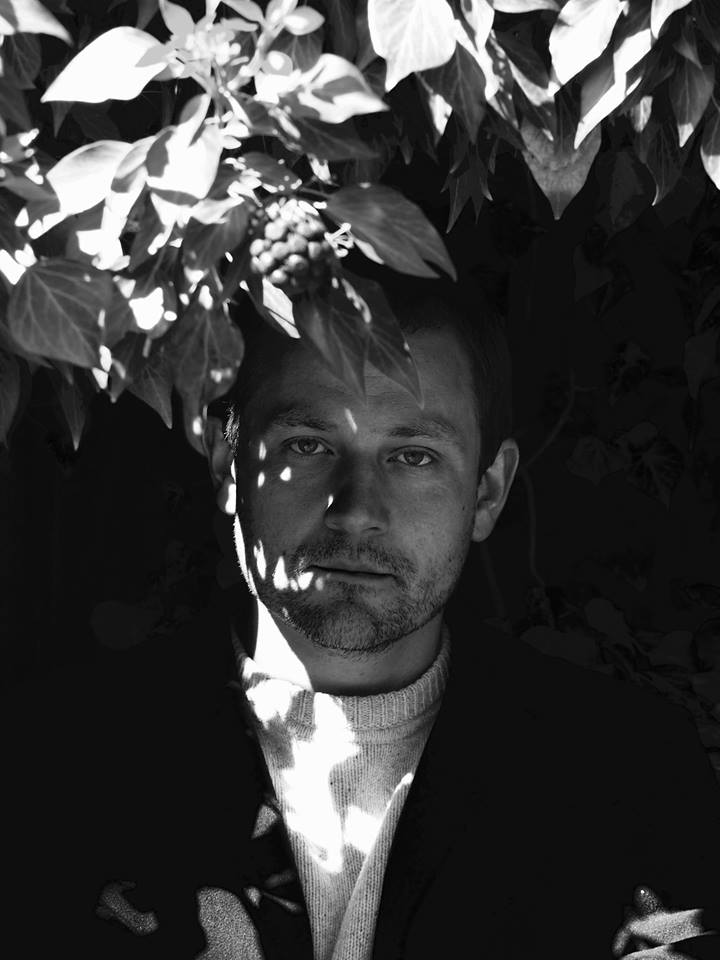 Artisten Lars Eriksson